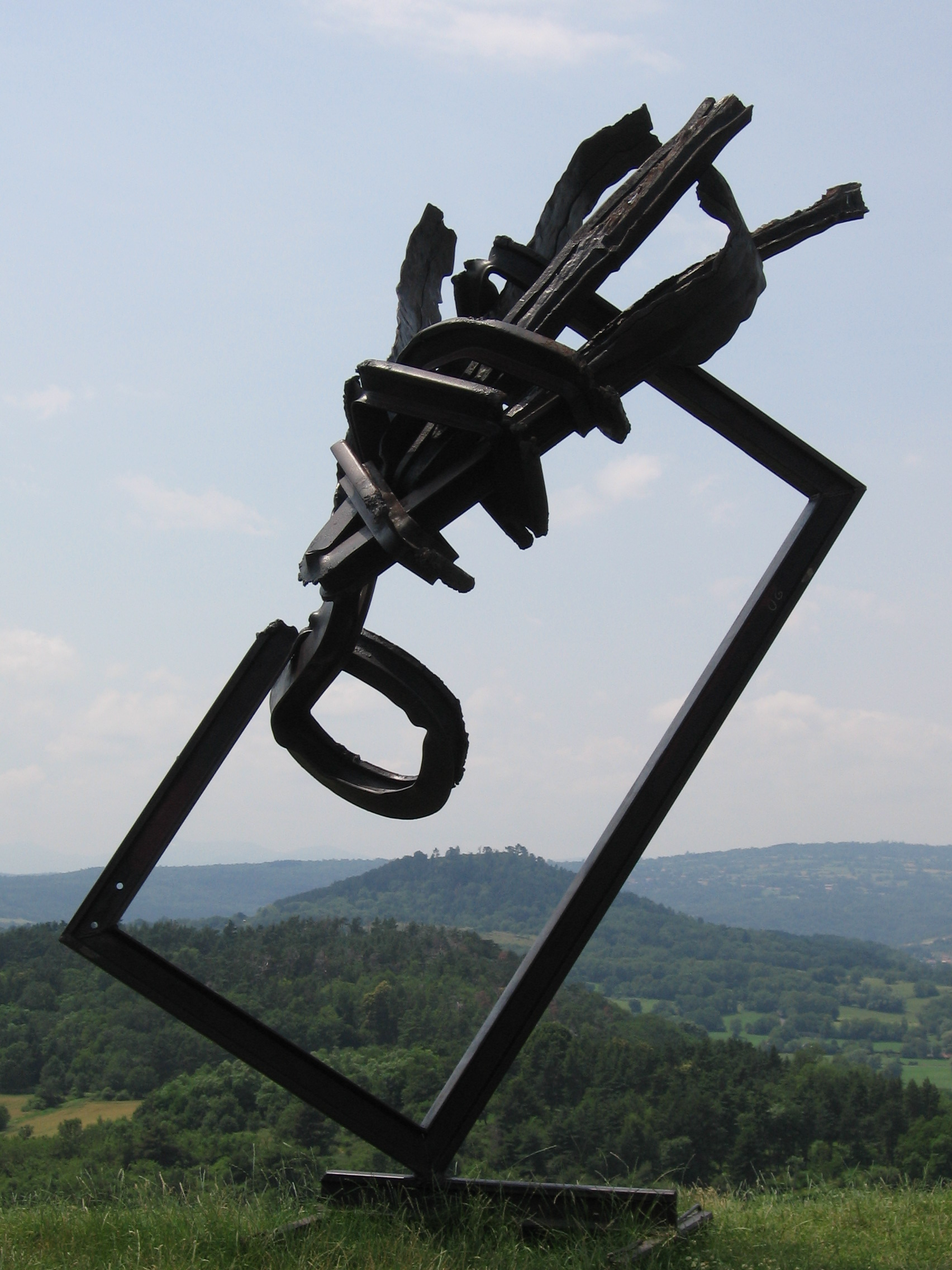 Sculpture d'Yves Guérin sur le Plateau de Gergovie en 2006